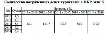 ежегодные траты туристов в НКР до 2014